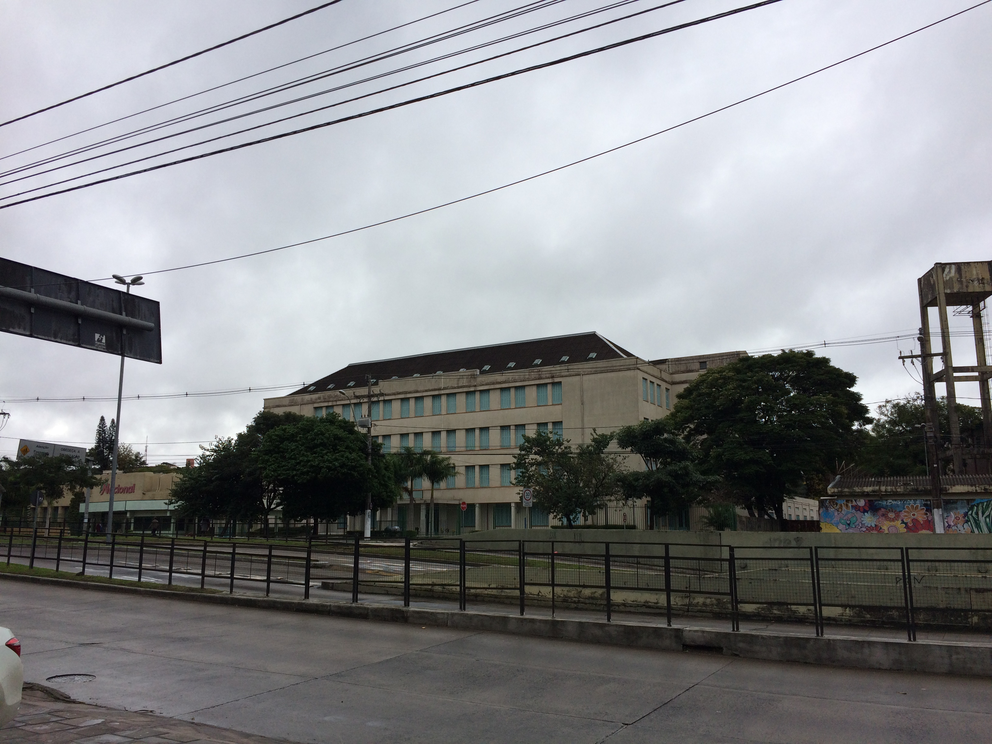 Prédio do Colégio Bom Jesus São Luiz, fechado em 2017.